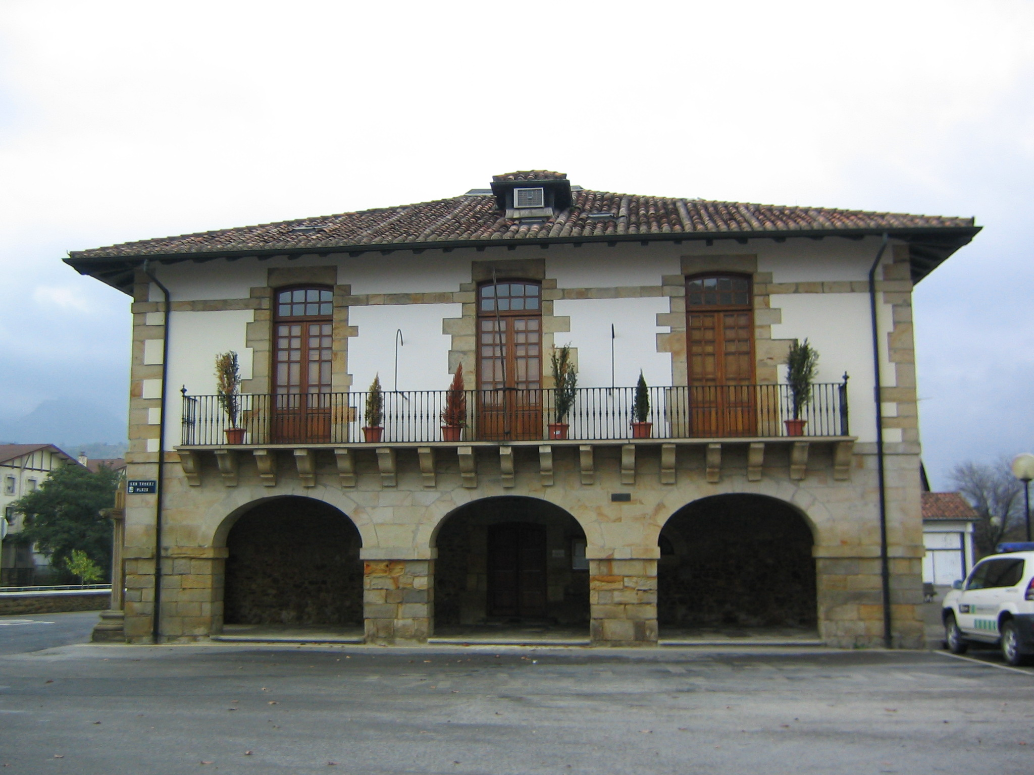 Casa consistorial de Abadiano , Vizcaya, País Vaco, España.